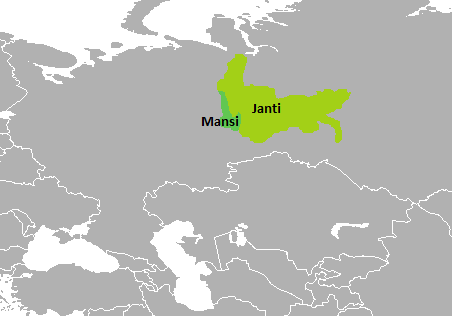 Lenguas obiungrias